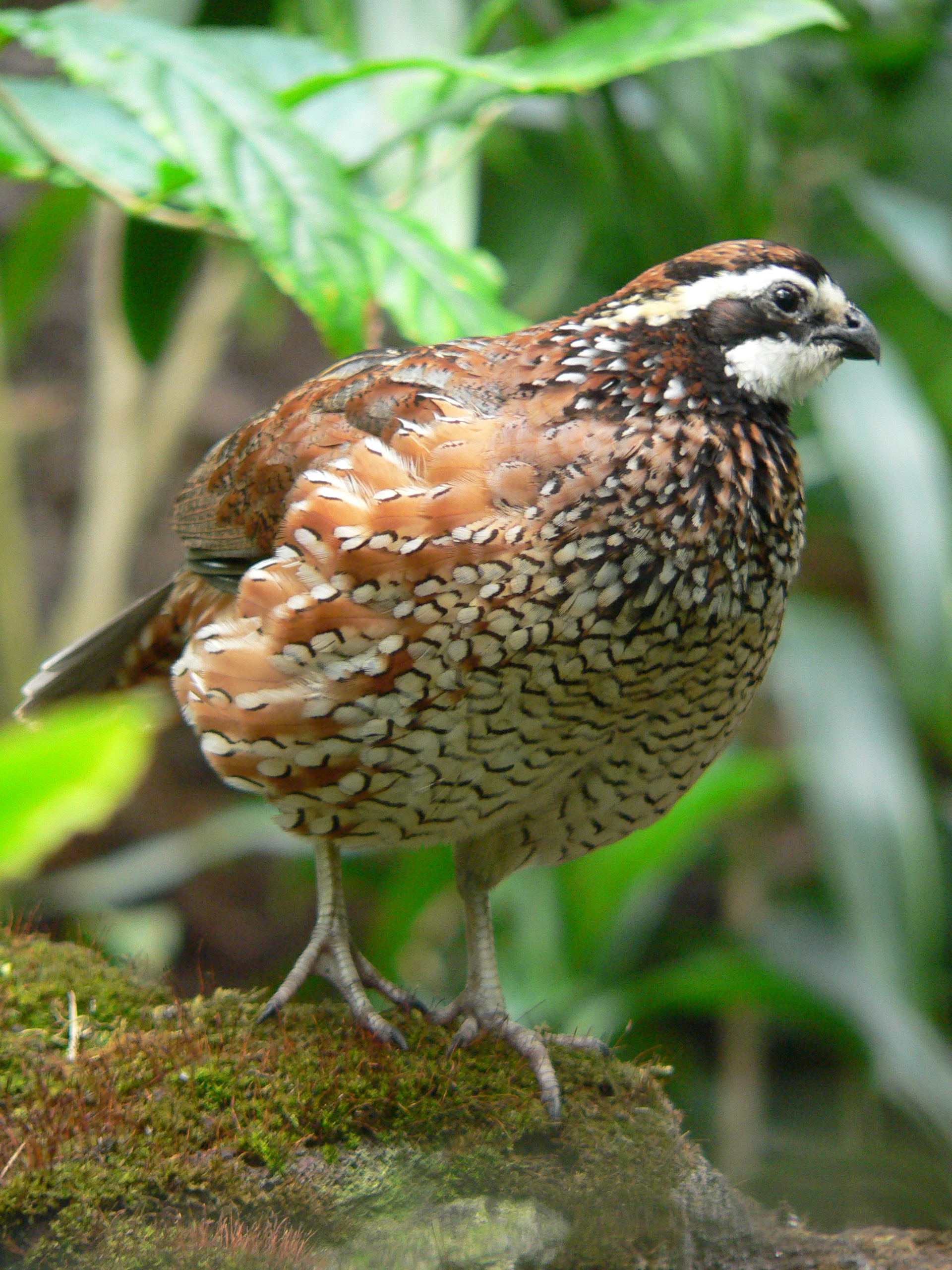 Virginia Wachtel